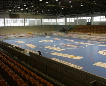 pavilhao de barcelos